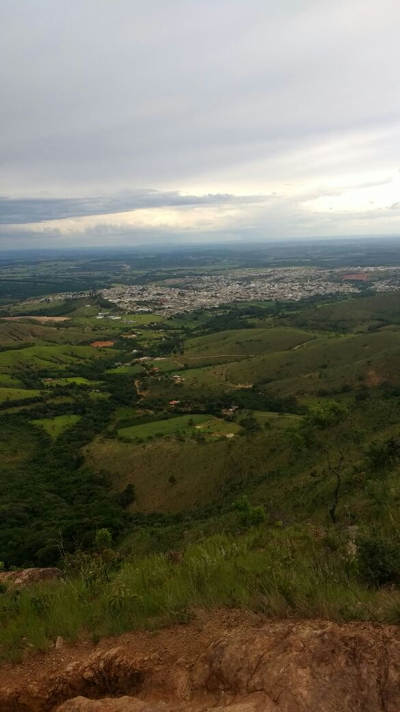 Imagem vista do alto da serra de pimenta.